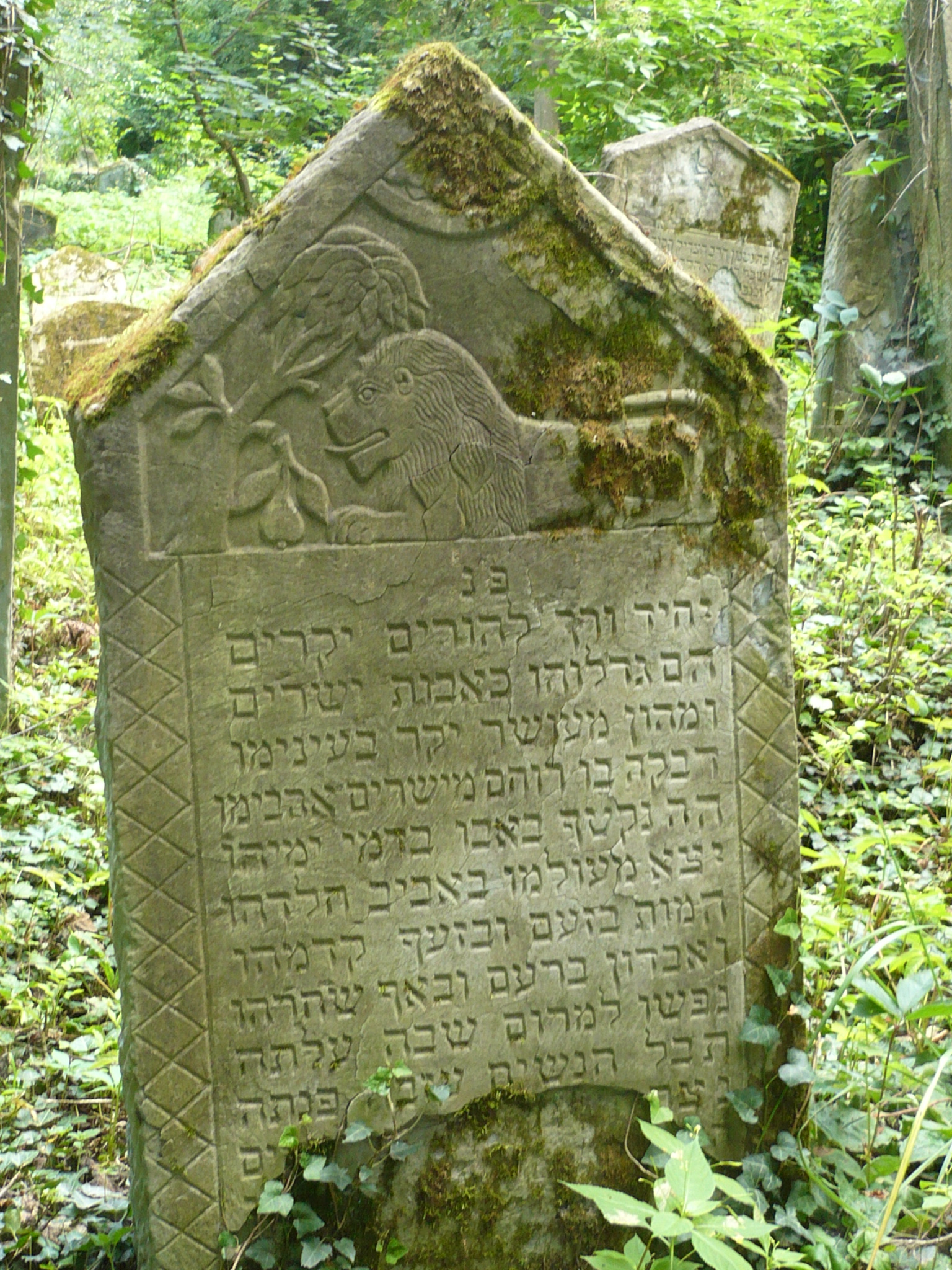 Przemyśl, nowy cmentarz żydowski